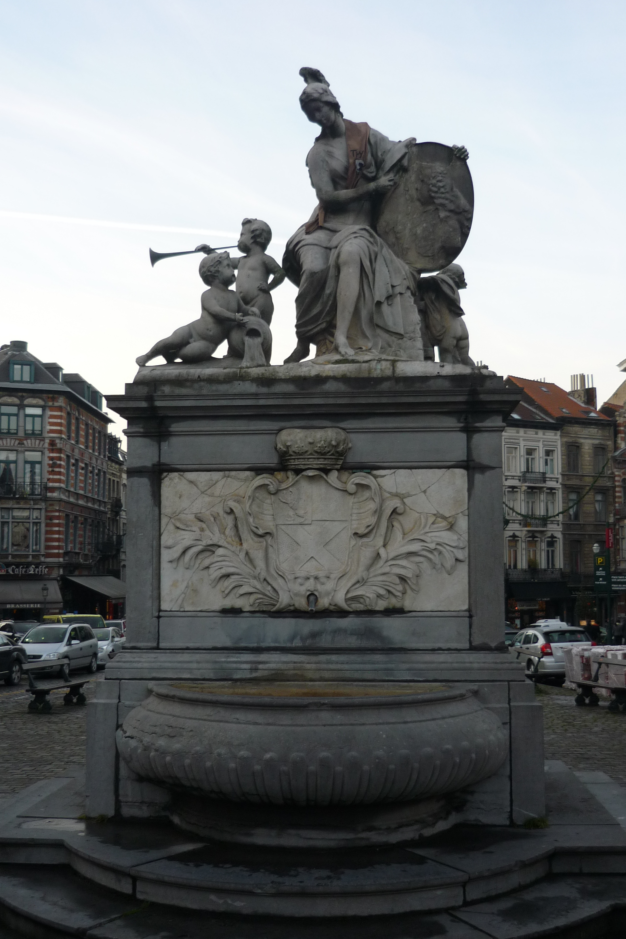 Fontaine de Minerve à Bruxelles, par le sculpteur Jacques Bergé, offerte à la ville de Bruxelles par Thomas Bruce , 1751.